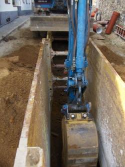 Flüssigboden, Ausschachten eines Rohrgrabens und Setzen einer Verbaubox